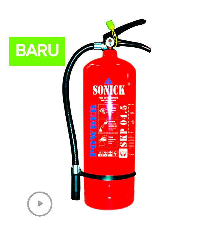 Alat Pemadam Api portable